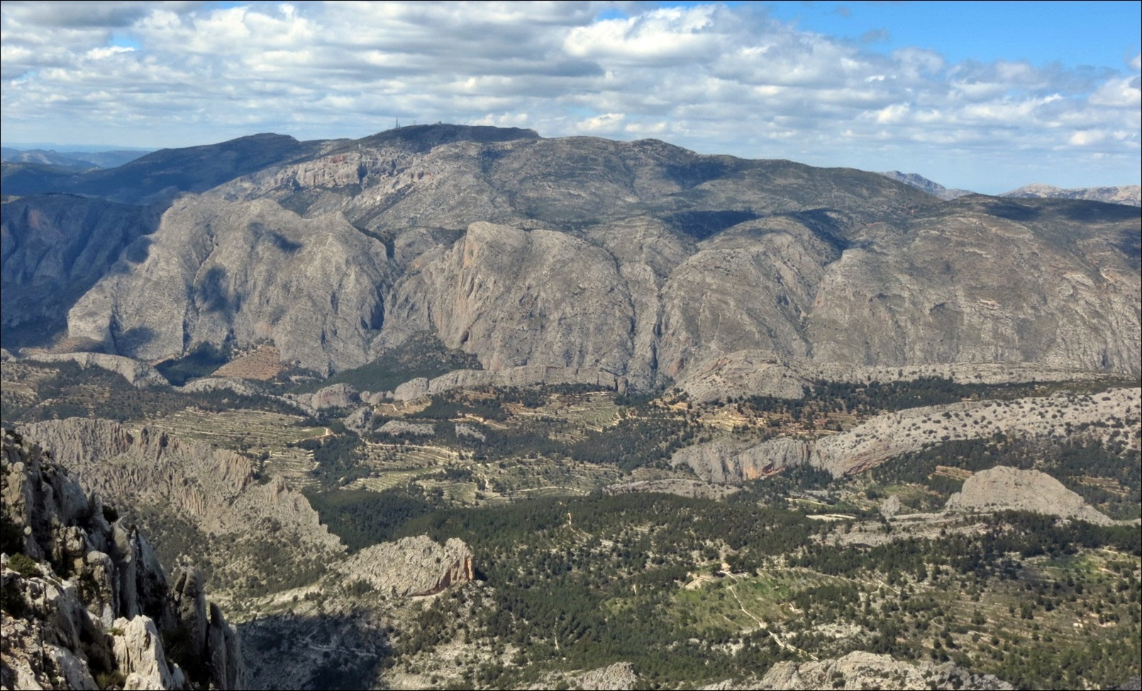 La Sierra de Aitana desde el Puig Campana